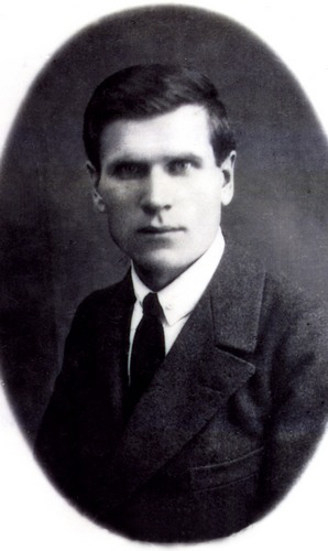 Макар Касцевіч (Краўцоў).